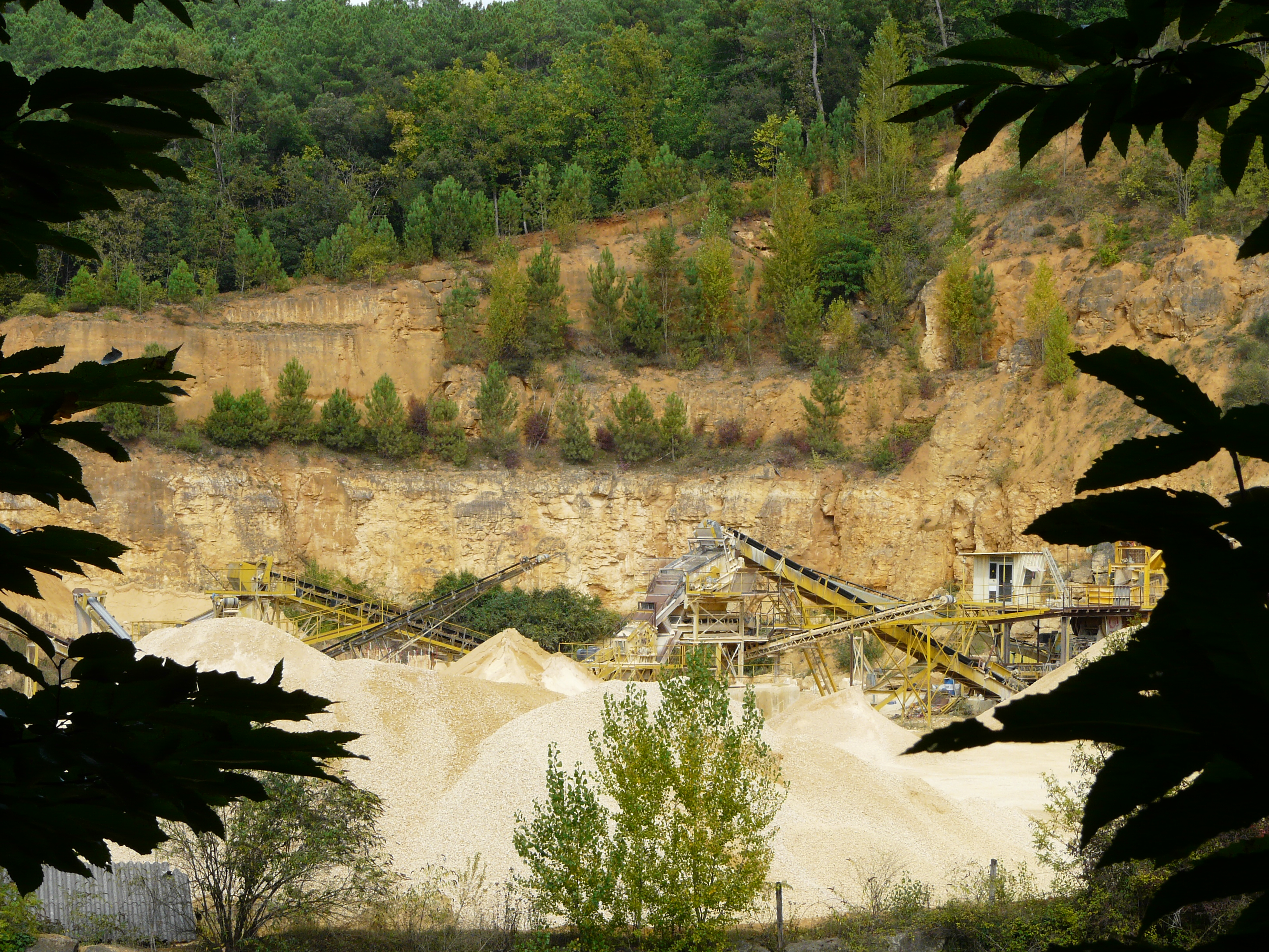 Carrière au sud-est de Madrazes, Sarlat-la-Canéda, Dordogne, France.